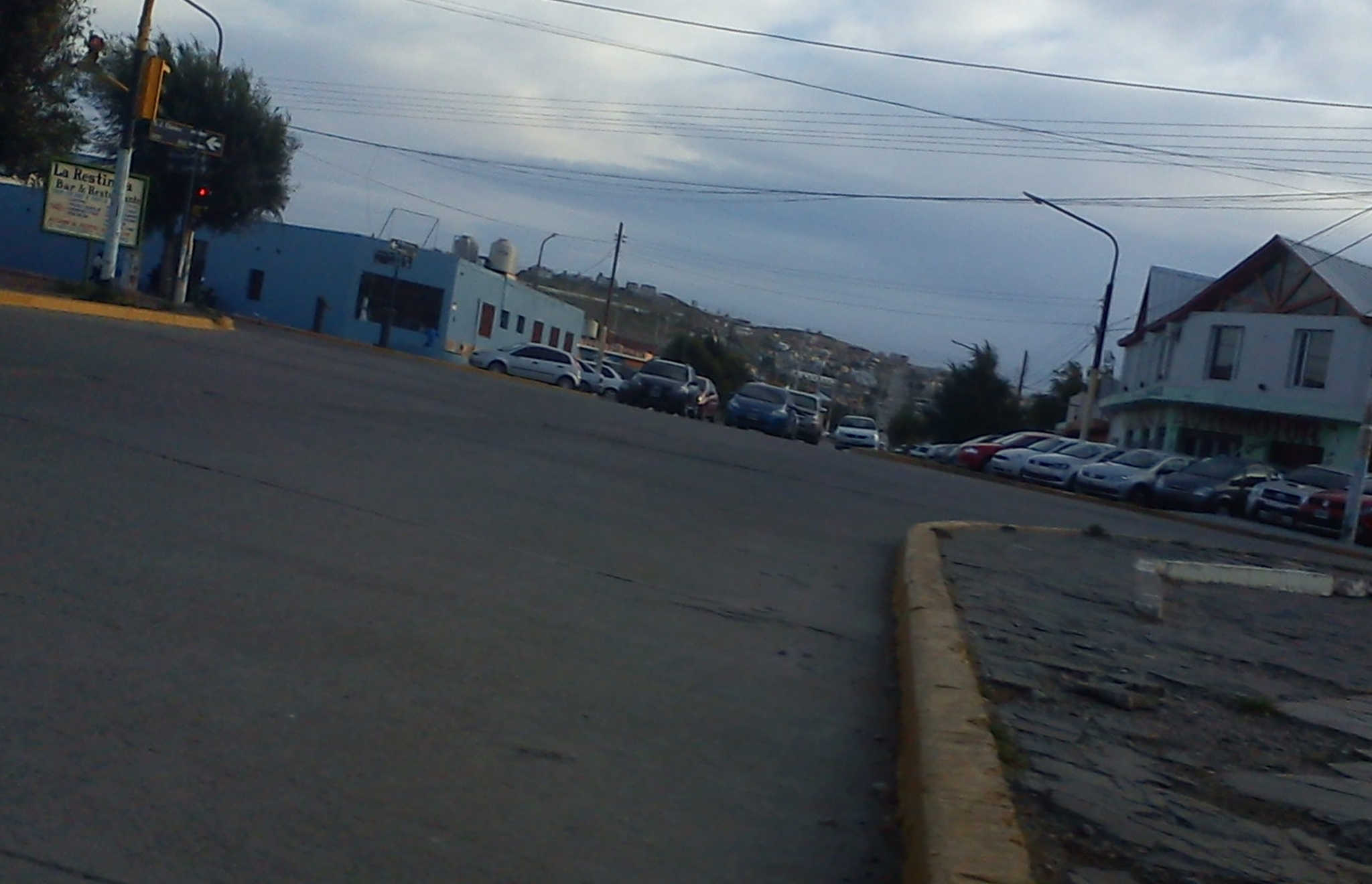 Calle San Jose Obrero